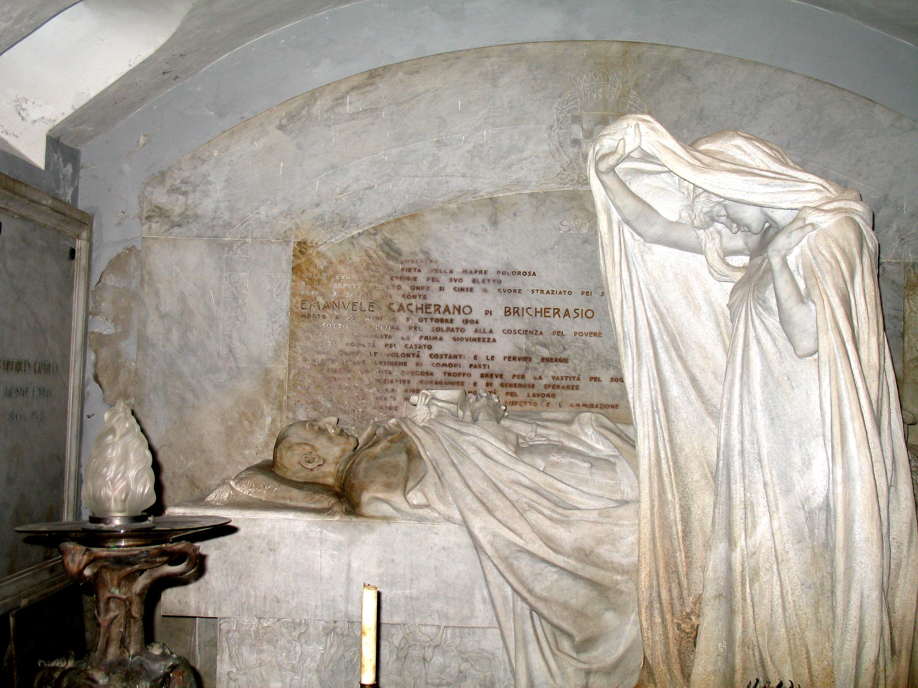 Monumento funerario per il conte Emanuele Cacherano di Bricherasio. Opera dello scultore Leonardo Bistolfi (1859-1933) - Cripta della Cappella Bricherasio a Fubine, Alessandria, Italia.